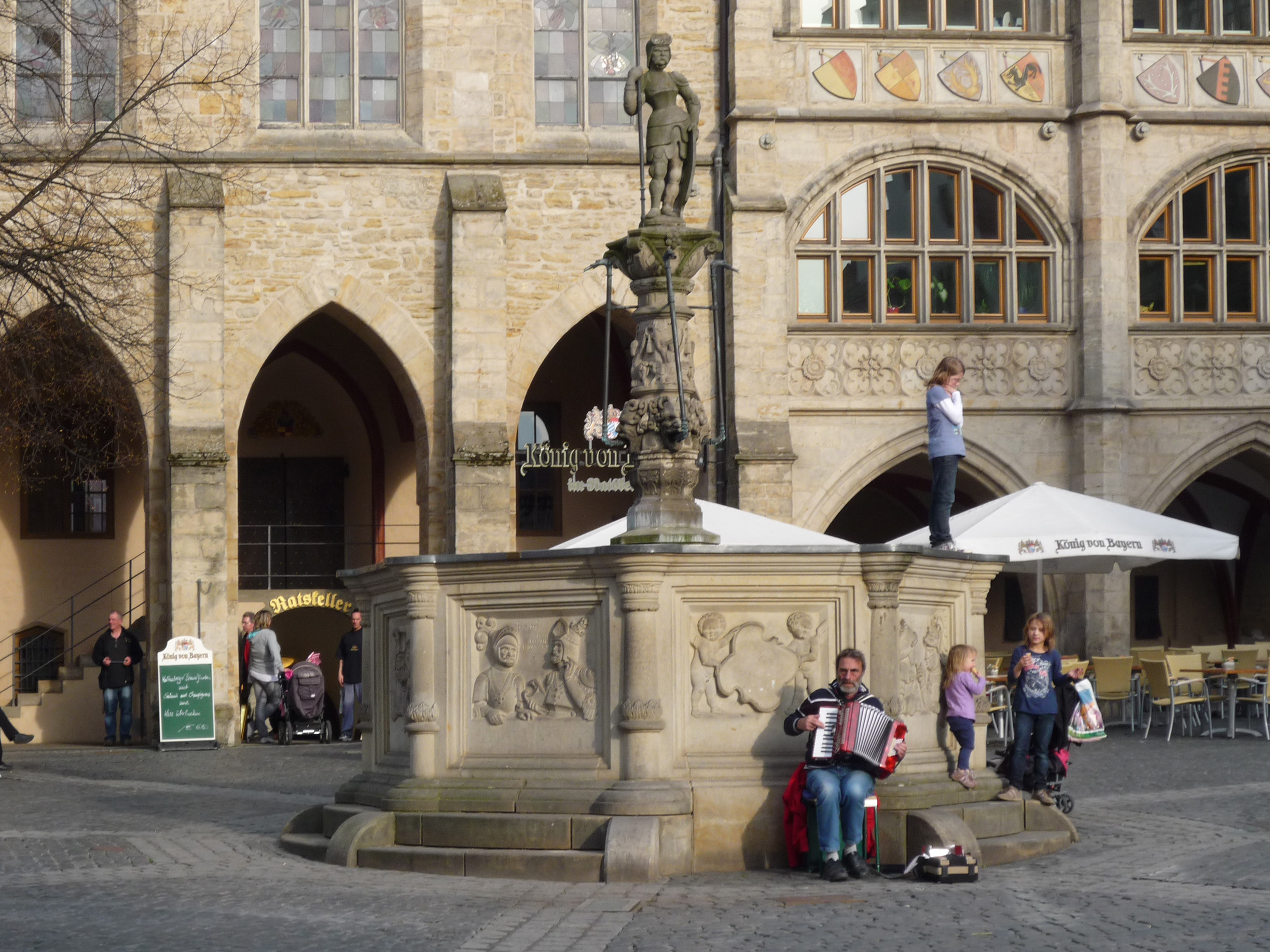 Rolandsbrunnen auf dem Marktplatz in Hildesheim vor dem Rathaus. Akkordeon: Volker Hoffmann